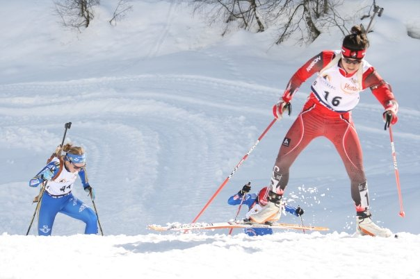 See Title